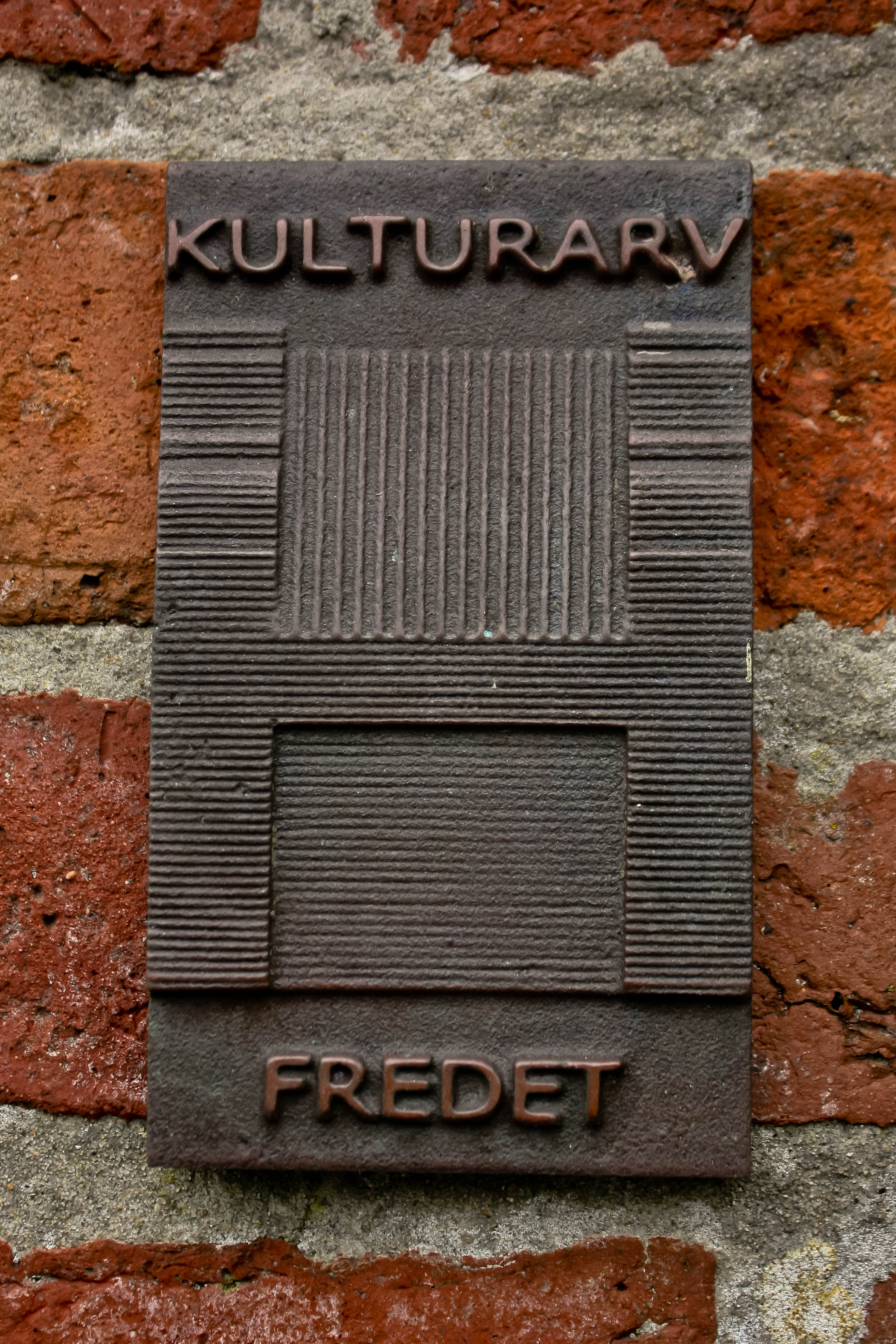 Den gamle Redningsstation, Havnebyvej 156, Rømø